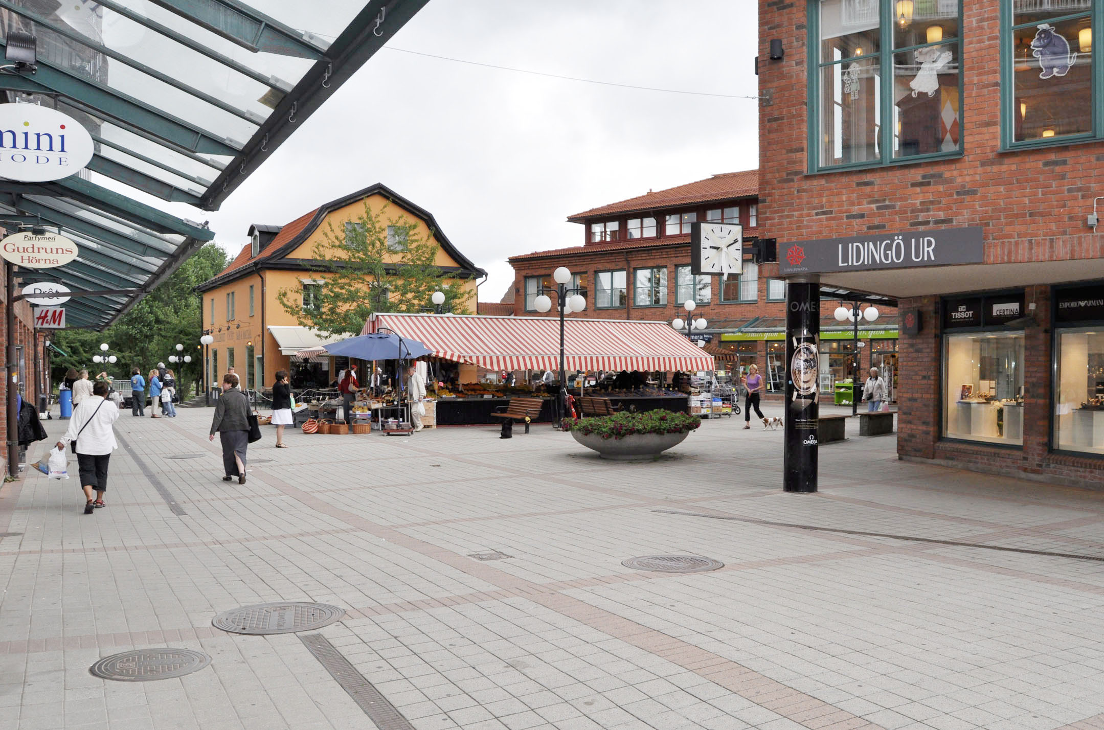 Torget vid Lidingö centrum. Det gula huset i bakgrunden inrymde innan Lidingö centrum byggdes, bland annat Lidingö Järnaffär och i övre planet bostäder. Idag inrymmer huset bland annat en restaurang och en pub. Nya Lidingö Järnaffär valde att förlägga sin verksamhet vid Kyrkviken invid de gamla spårvägshallarna som idag är ett hotell.